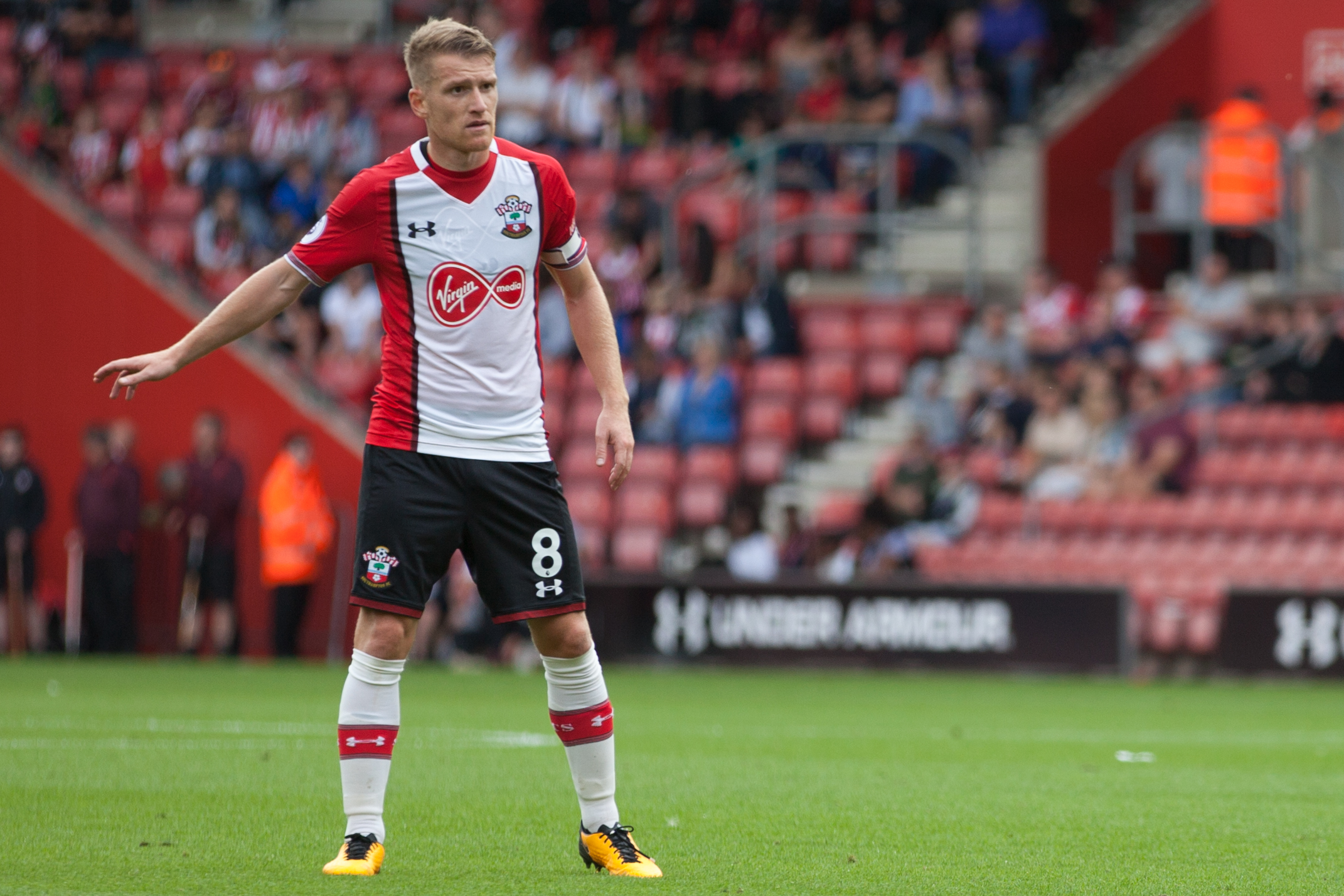 Image by Steve Hogg